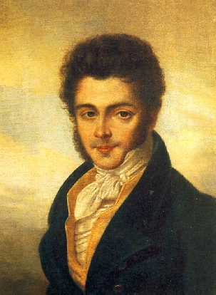 Граф Миньято Риччи (1792-1860 или 1877), граф, поэт, певец-любитель; муж Екатерины Петровны Луниной, из-за романа с З.А.Волконской оставил жену.